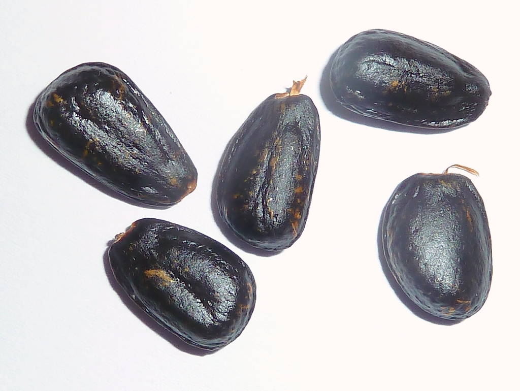 Annona cherimola (chirimoya ) : Semillas sueltas frescas.